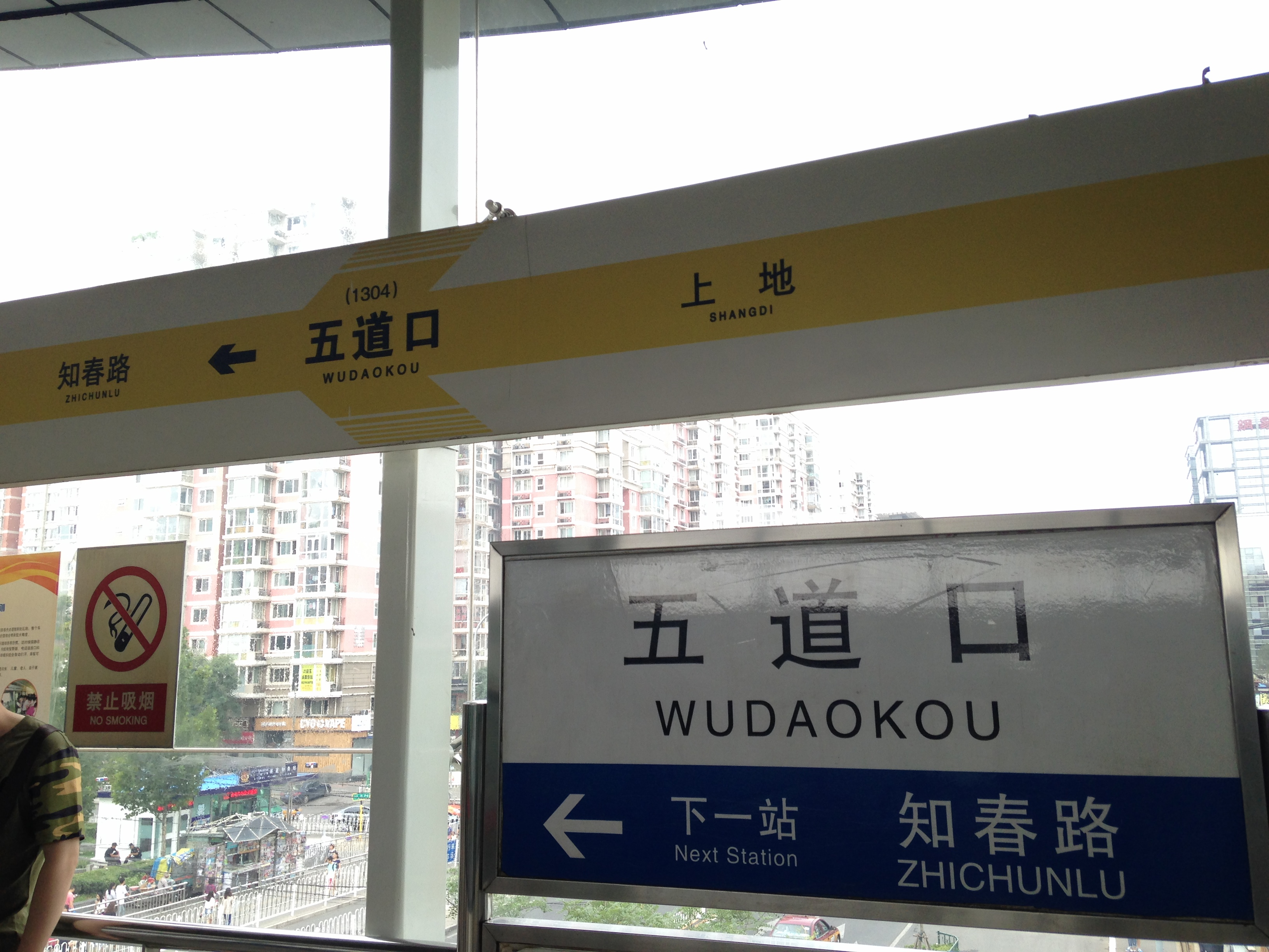 五道口駅の駅名標